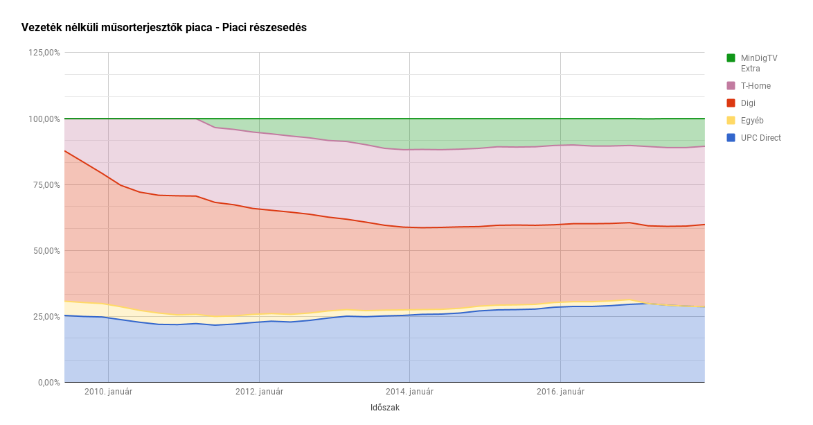 Piaci részesedés a vezeték nélküli műsorszóró szolgáltatók esetében